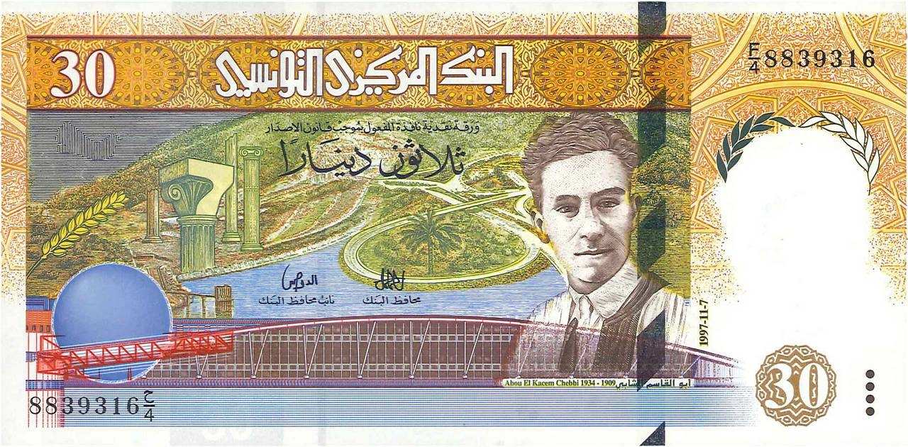 20 Tunisian dinar (obverse)